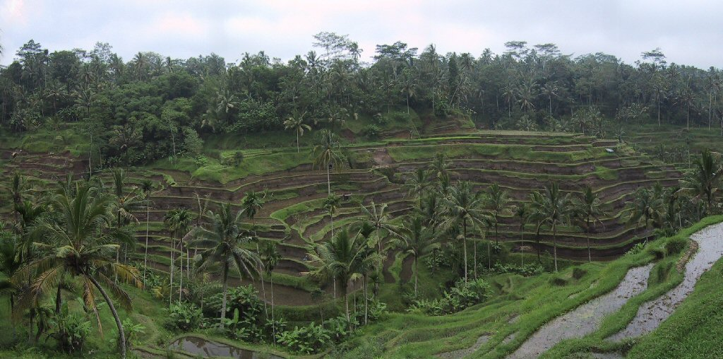 Sawah op Bali - Indonesië Foto door mijzelf genomen. Vrij te gebruiken.